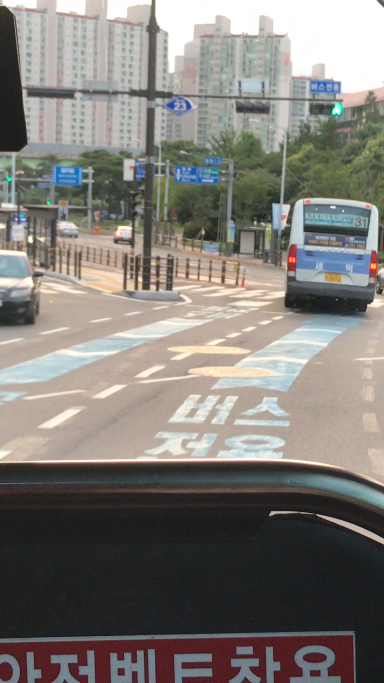 대한민국 부산광역시의 중앙버스전용차로의 모습이다. 해당 사진은 1002번 차량 내에서 촬영한 것으로 원동IC교차로와 원동교앞 정류장 사이이다.